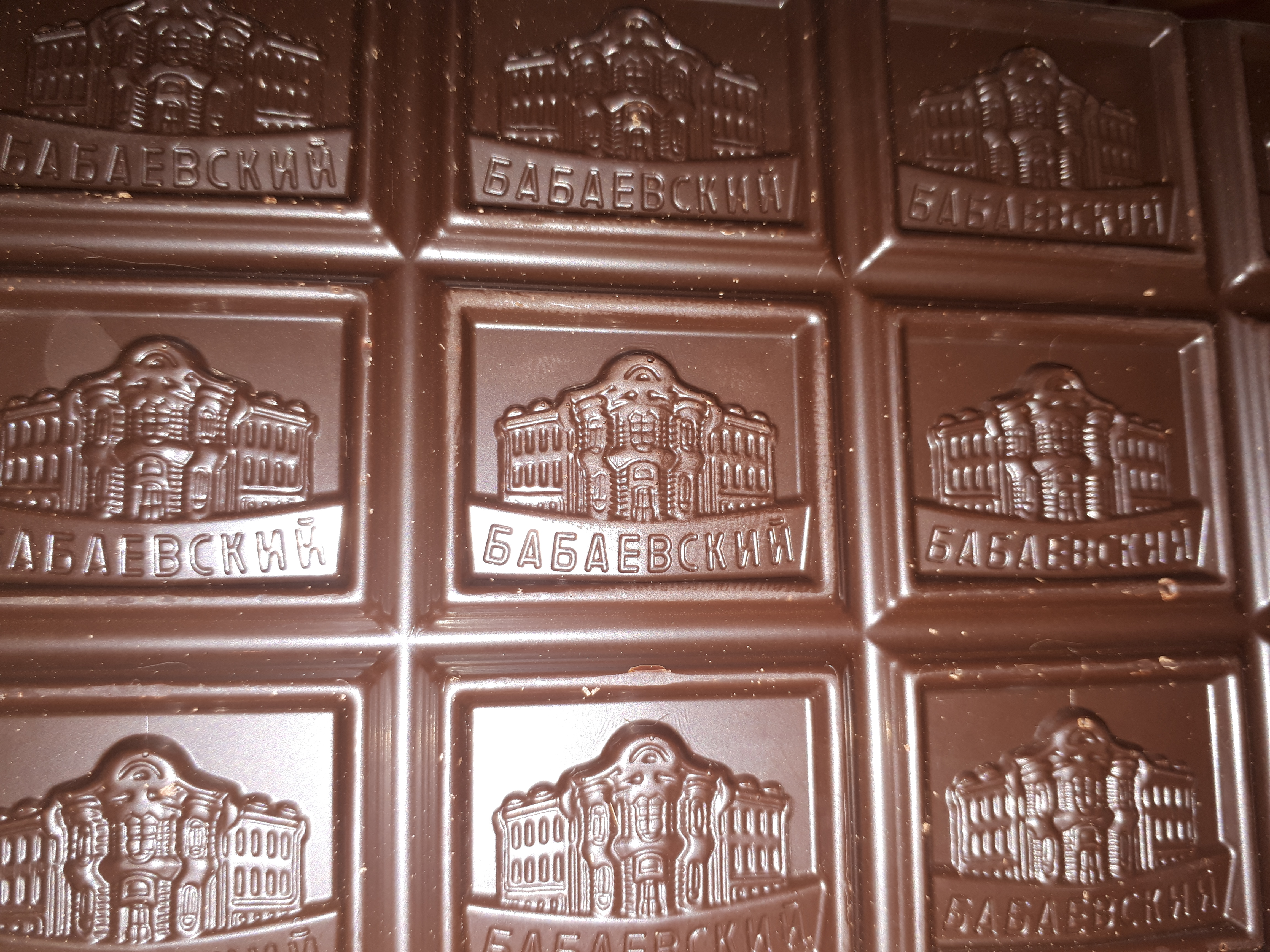 Бабаевский шоколад